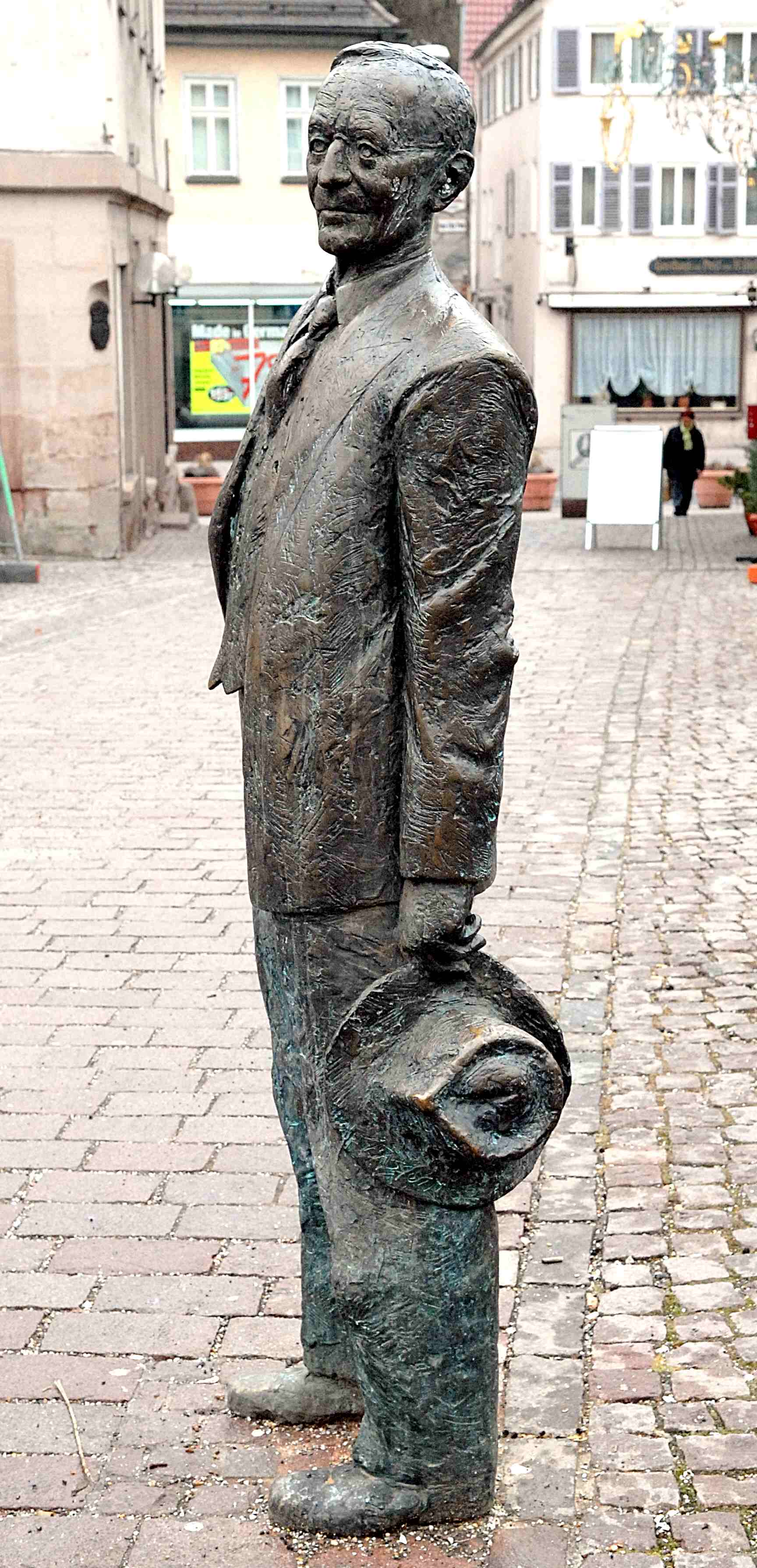 Bronzeskulptur von Hermann Hesse auf der Nikolausbrücke Calw